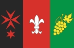 Vlajka Morašic u Znojma